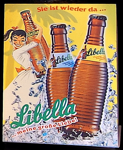 Werbeaufsteller: Libella-Flaschen in klassischer Ausformung